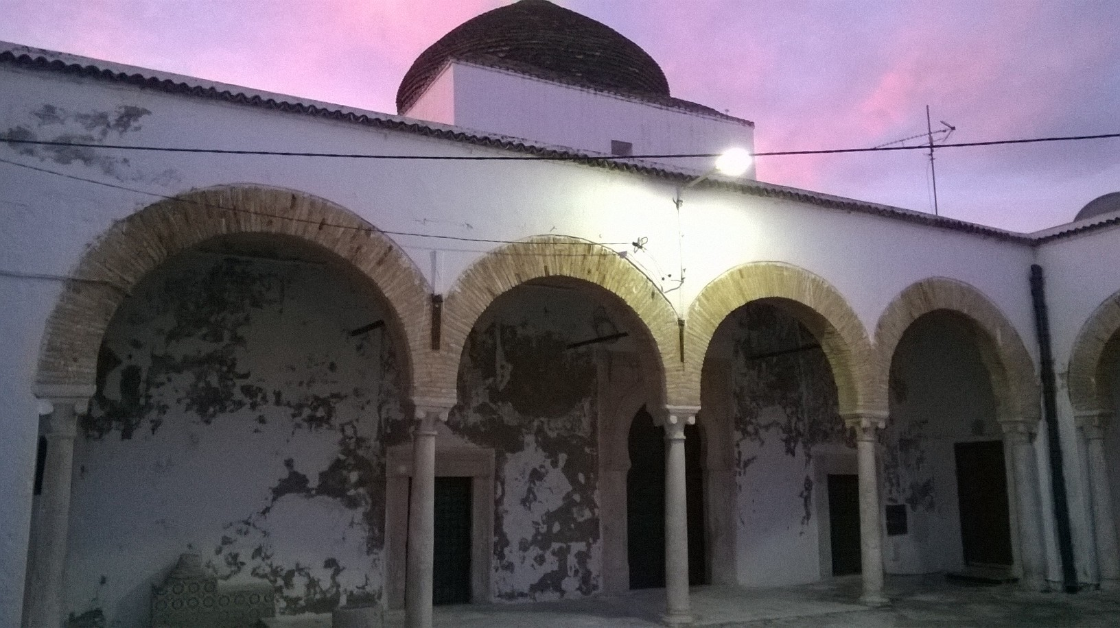 Bab El Khadra , la médina de Tunis